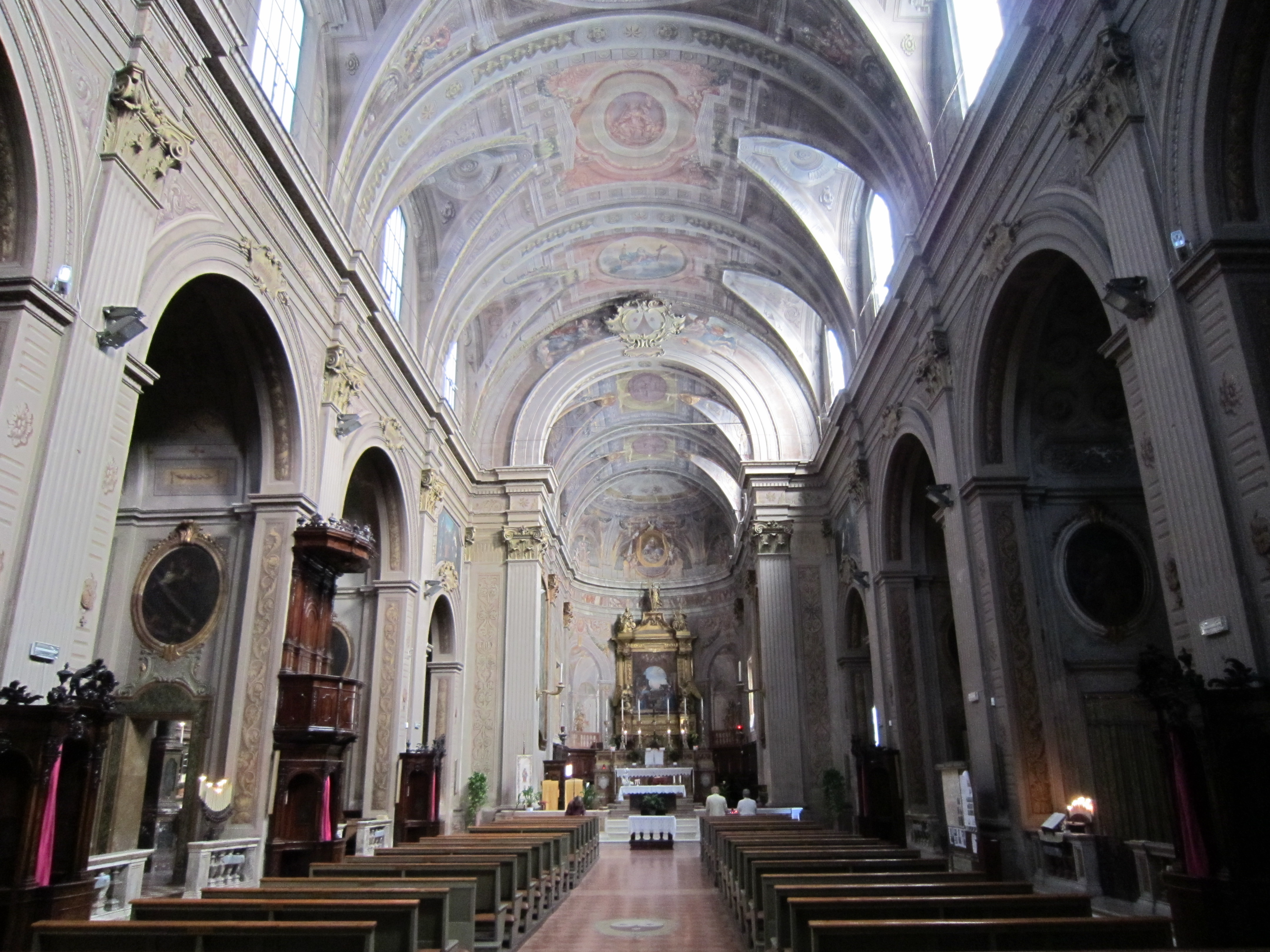 Interno della Chiesa del Carmine (Forlì), foto propria